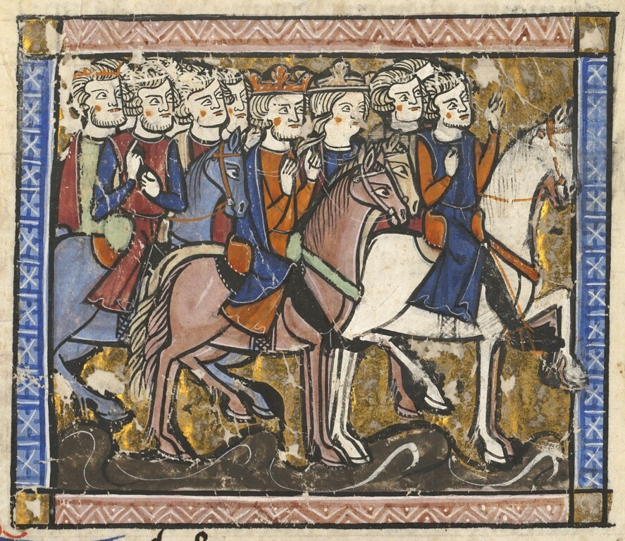 Amaury Ier et Marie Comnène chevauchant